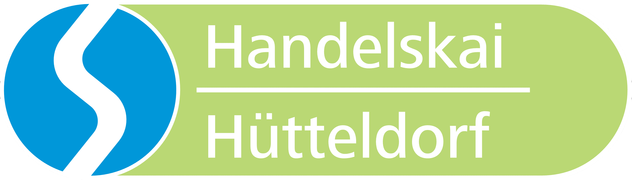 S-Bahn (S 45 "Vorortelinie") Handelskai - Hütteldorf Wien